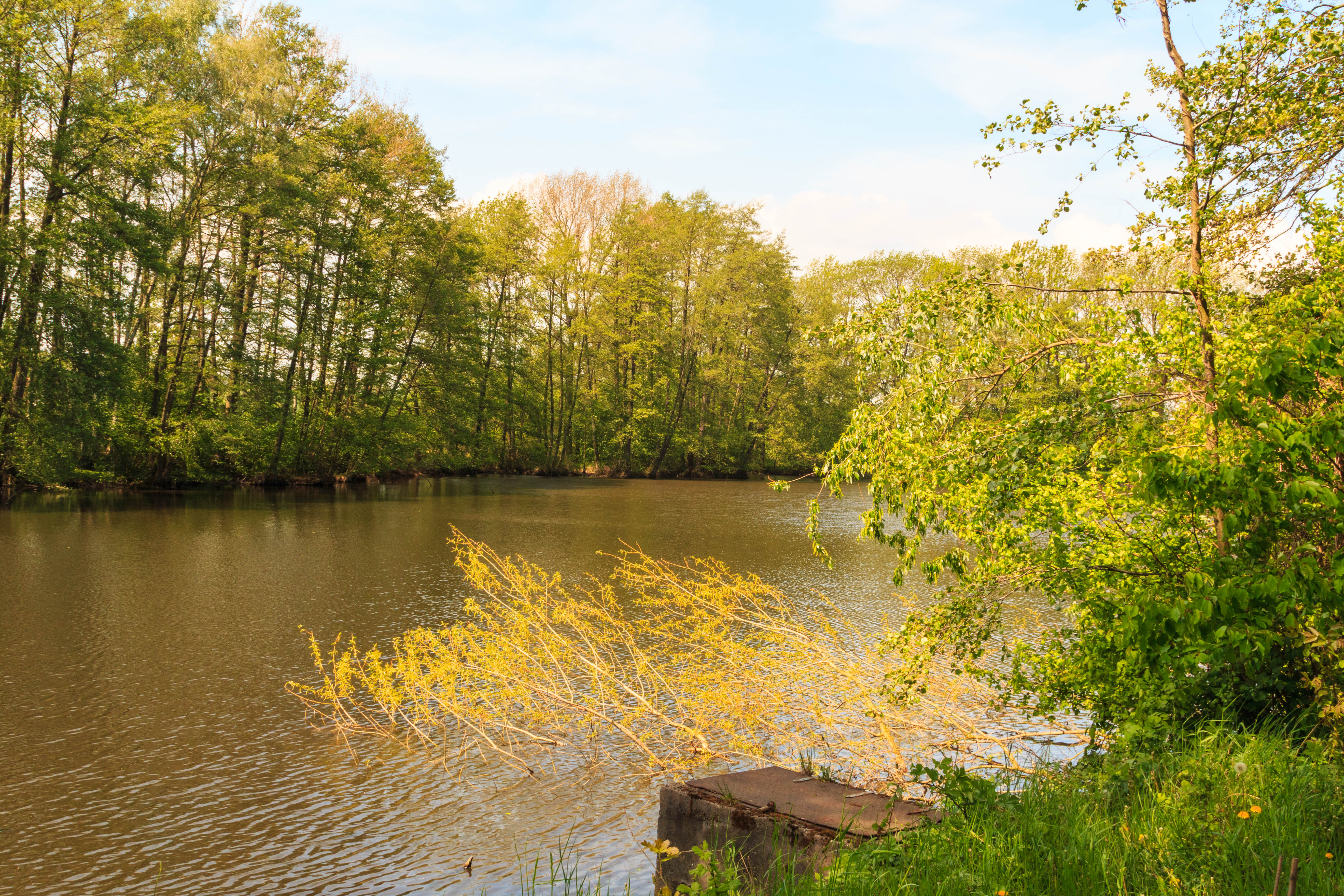 Rybník Prachovna Project: Vodstvo.